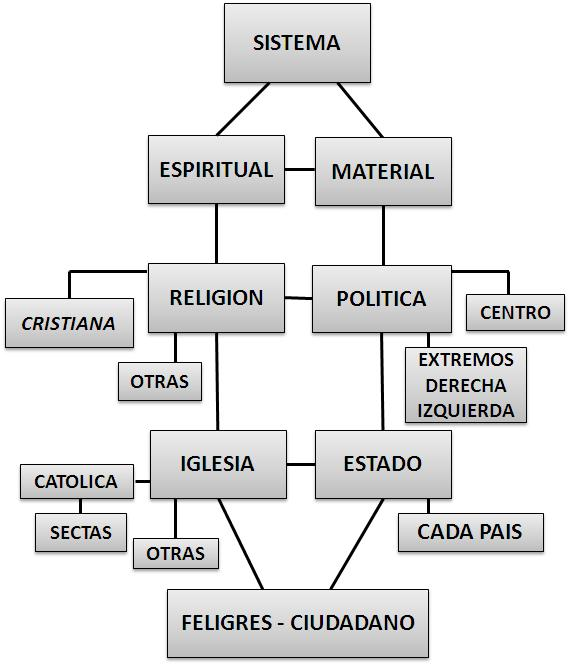 Mapa conceptual de los componetes basicos del sistema